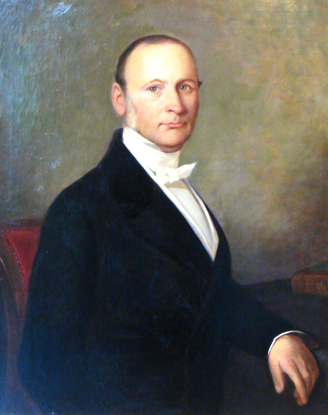 Magnus Huss 1807-1890. Professor vid Karolinska institutet.